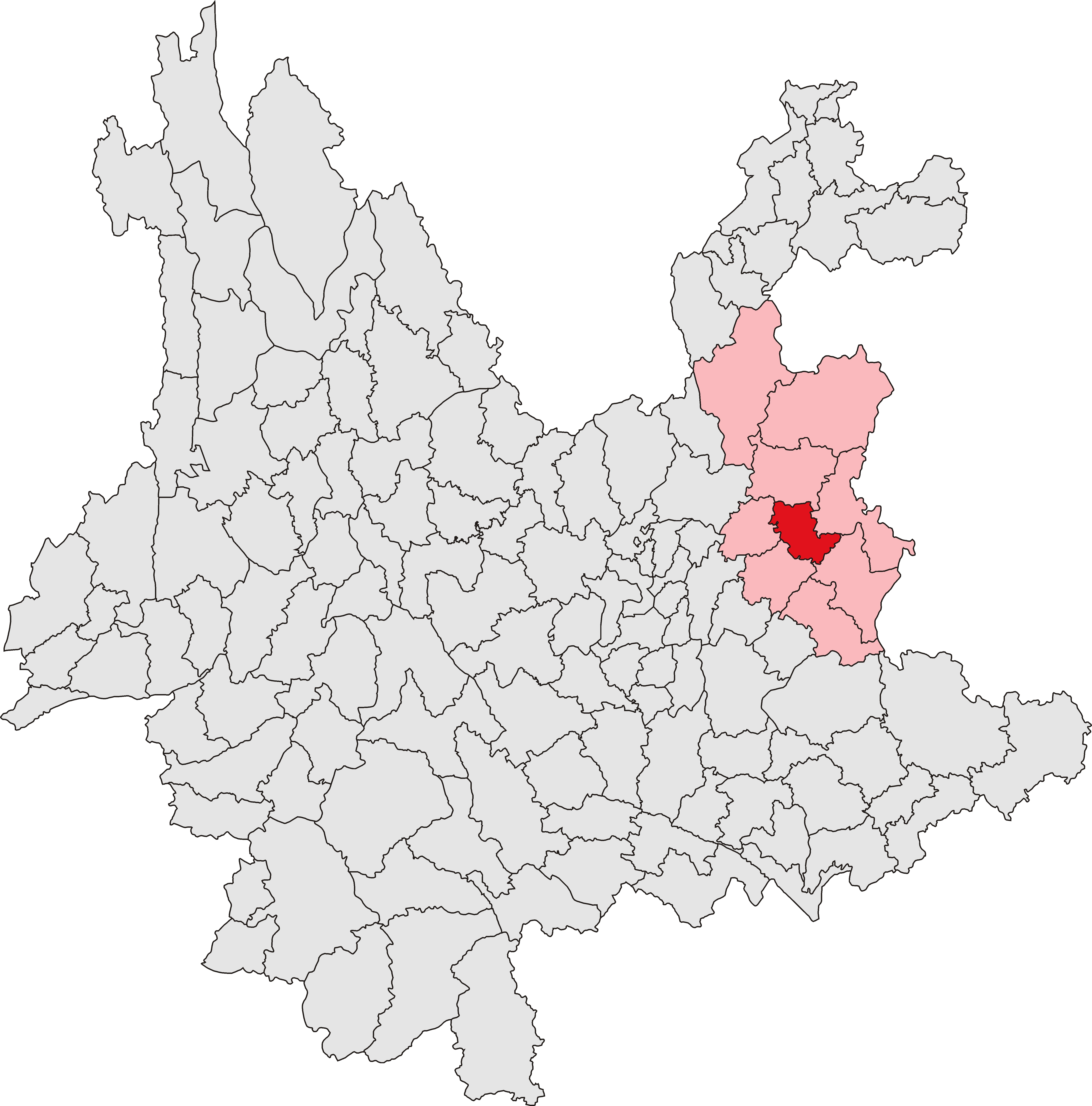 麒麟区位置图